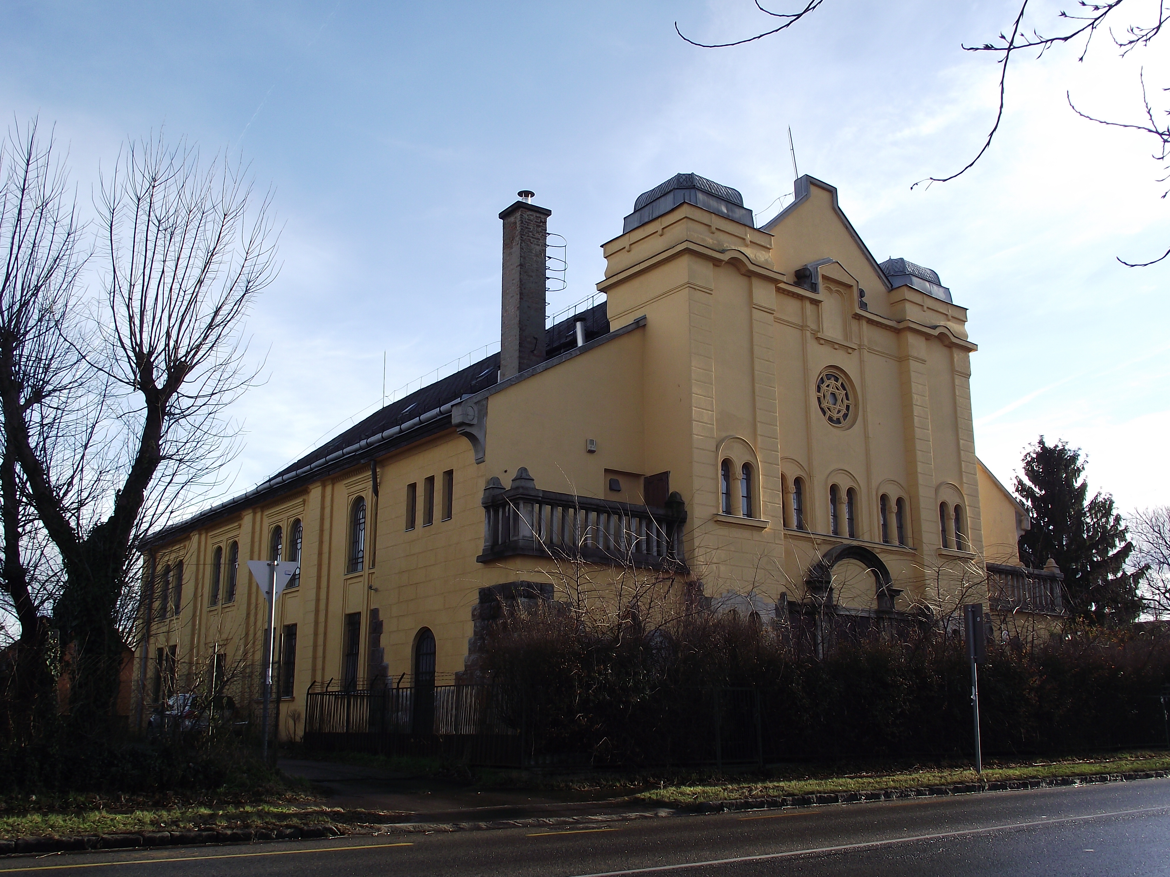 Rákospalotai volt zsinagóga 2015 januárjában